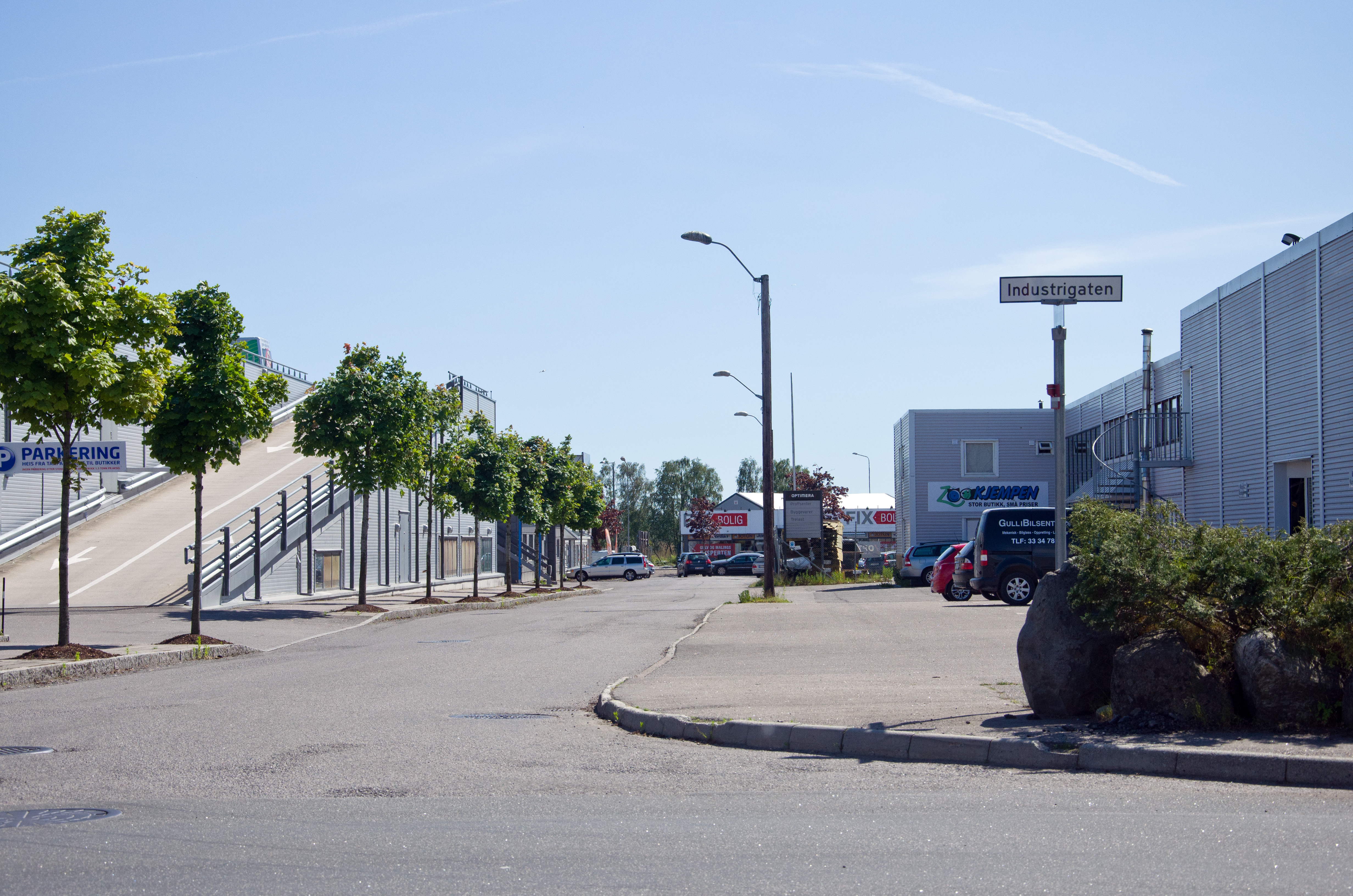 Håndverkergaten